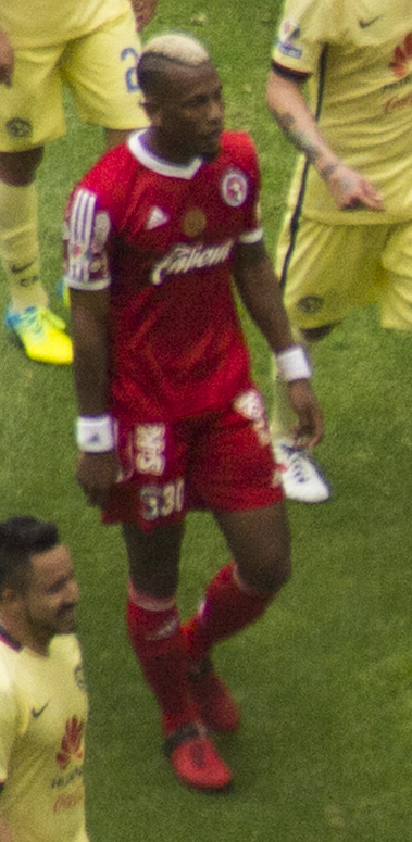 América vs Tijuana